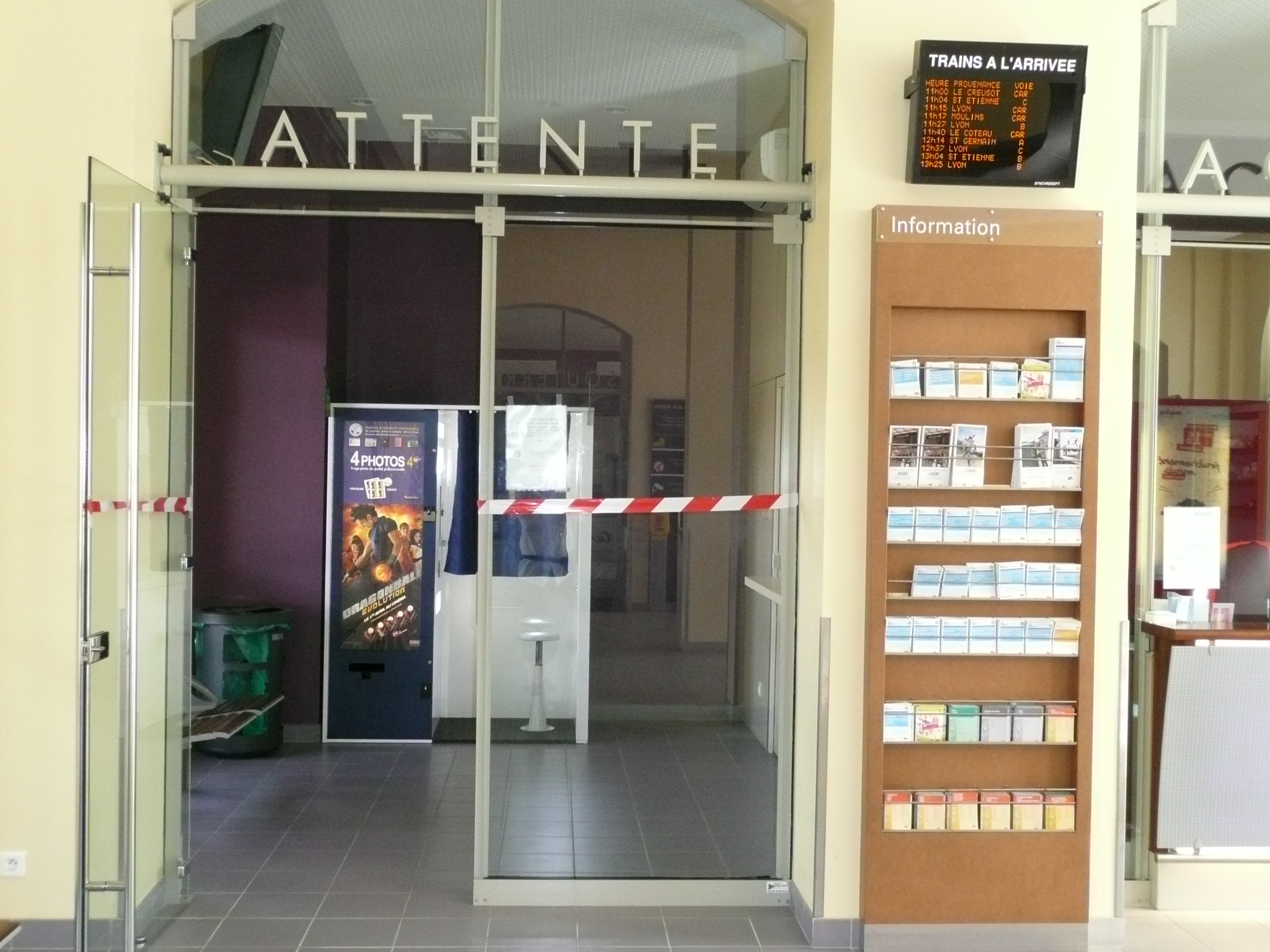 Photo de la nouvelle salle d'attente (2 places assises!)de la gare SNCF de Roanne après rénovation (a noter que l'ancienne avait 10 places).